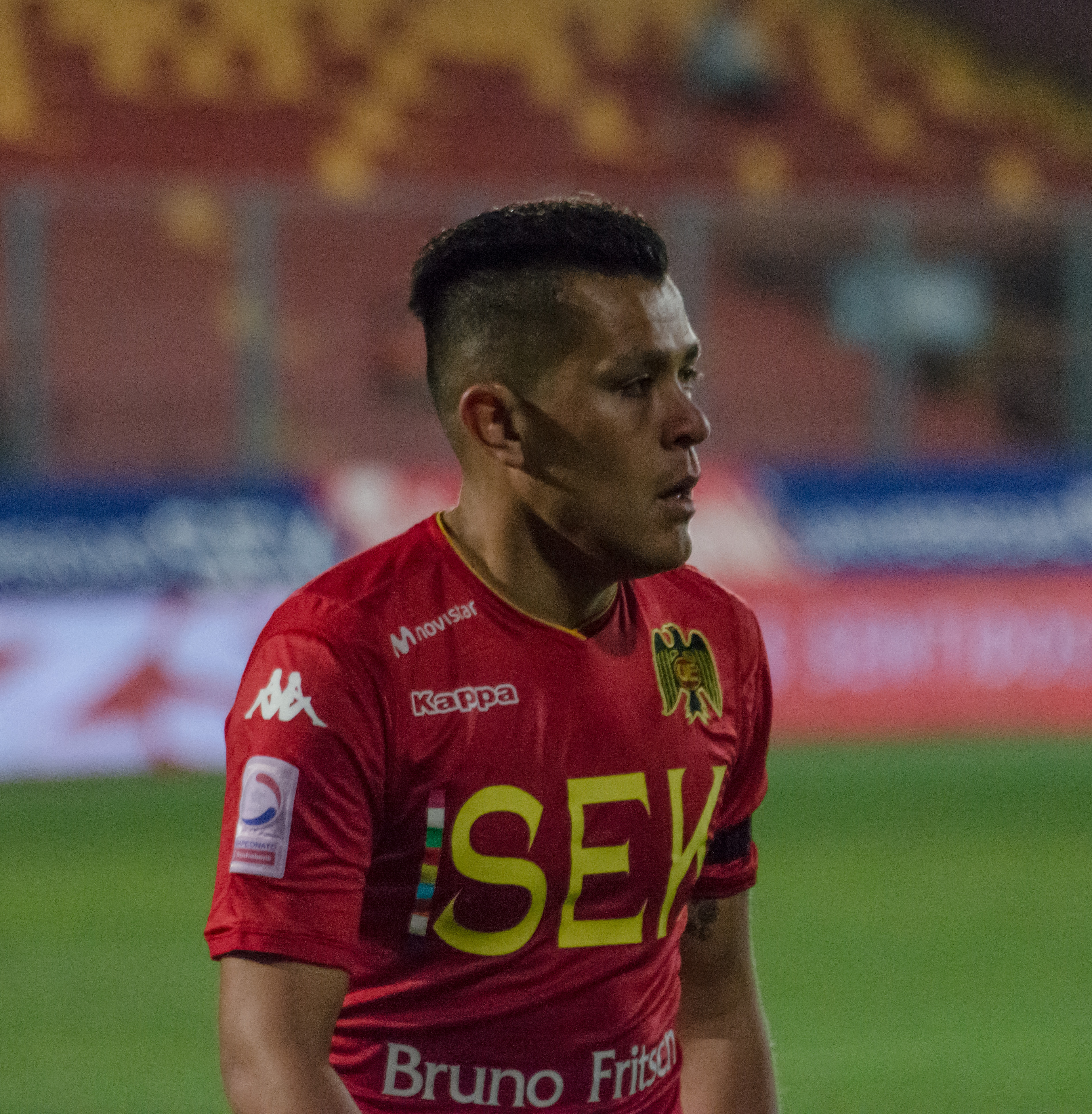 Carlos Muñoz Rojas, Unión Española v Curicó Unido, Estadio Santa Laura, Independencia, Santiago, Chile